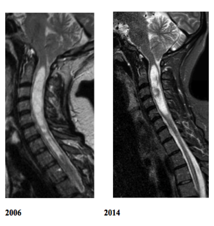 Imágenes cortesía de la Chiari & Scoliosis & Syringomyelia Foundation. Las imágenes obtenidas por MR se tomaron antés y después de la Sección del Filum Terminale.